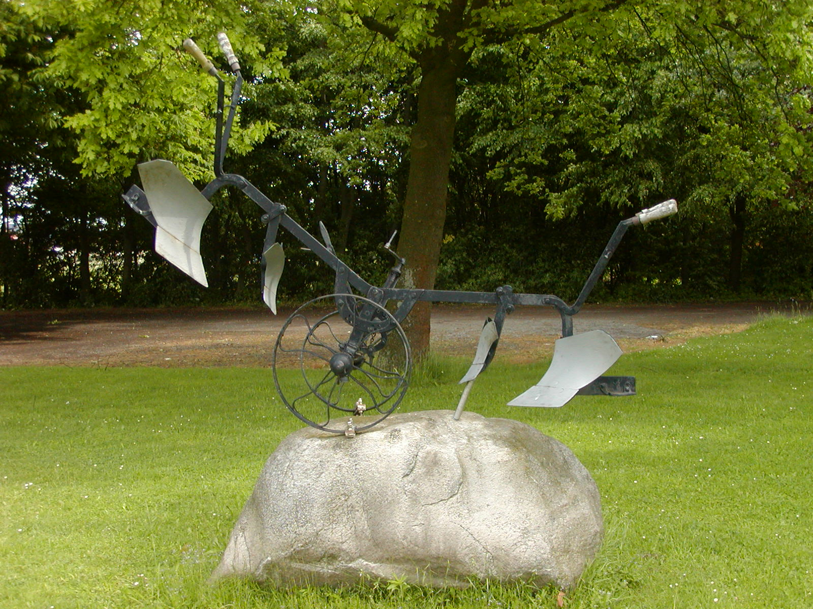 Pflug an der Friedenseiche bei Minden-Todtenhausen, Nordrhein-Westfalen.